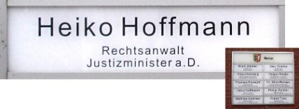 RA-Schild von Heiko Hoffmsnn